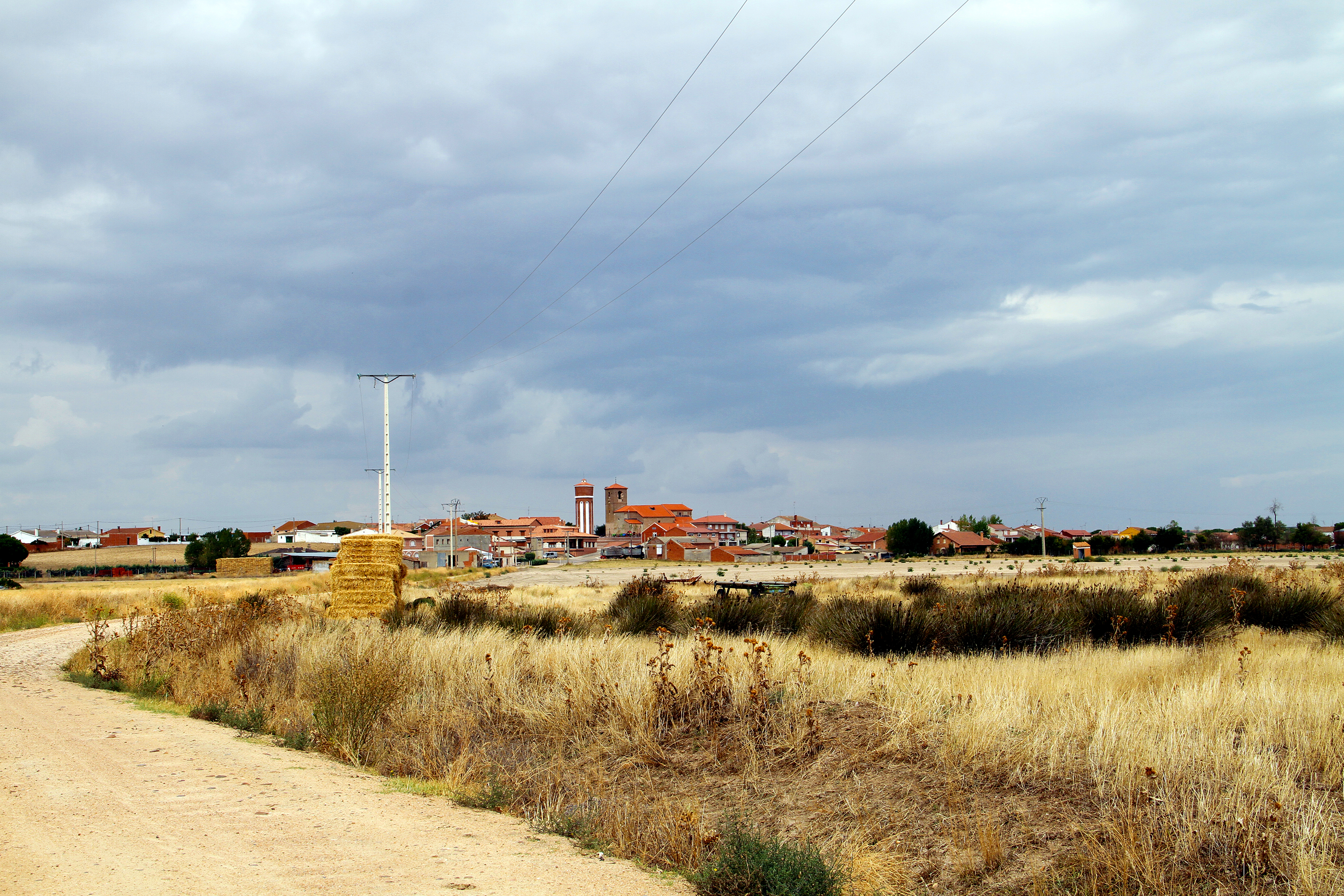 Panorámica de Pozal de Gallinas desde la Cava, por Jose Maria Rodriguez Martin, "Chefo"